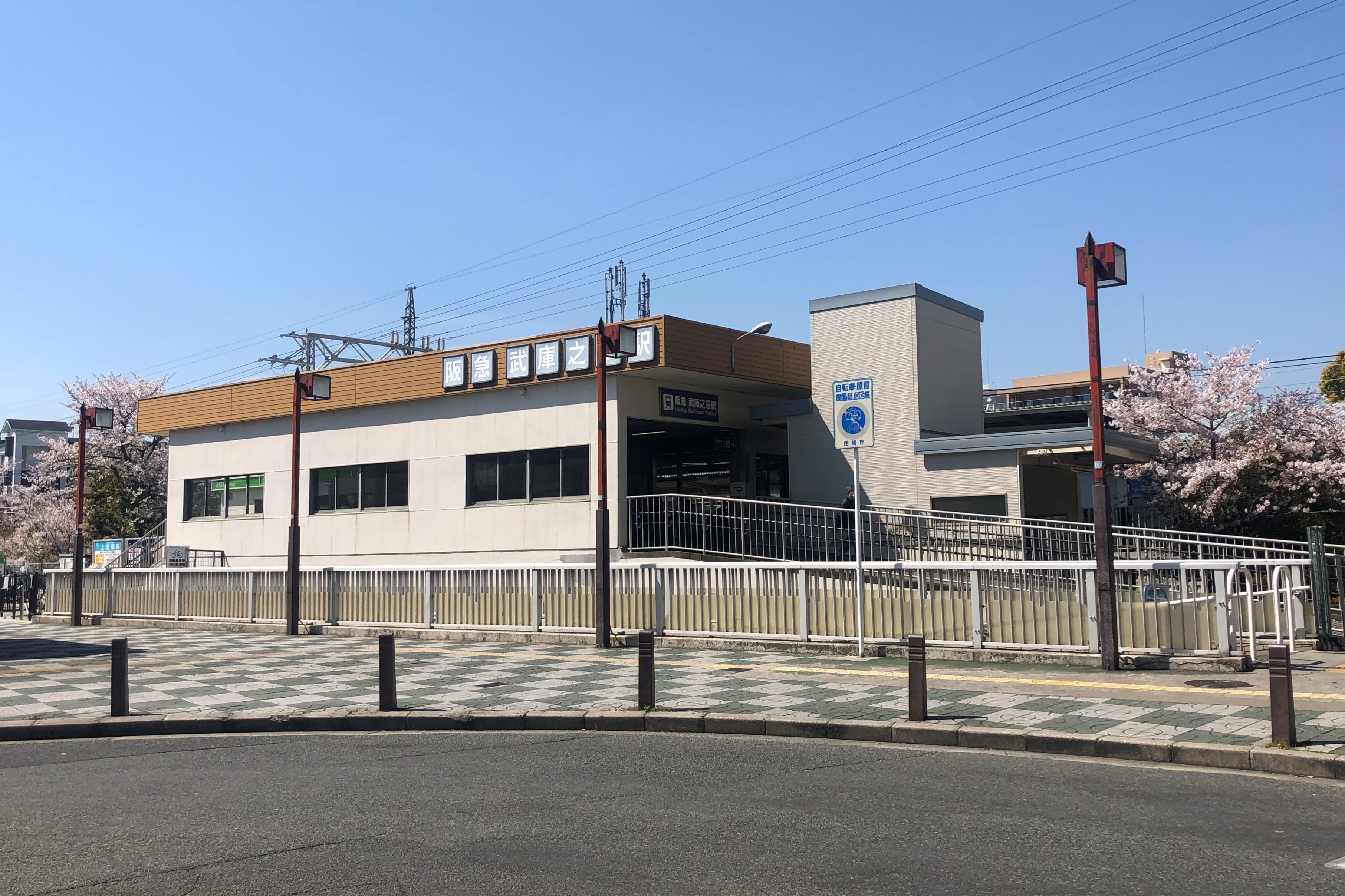 阪急電鉄武庫之荘駅南口